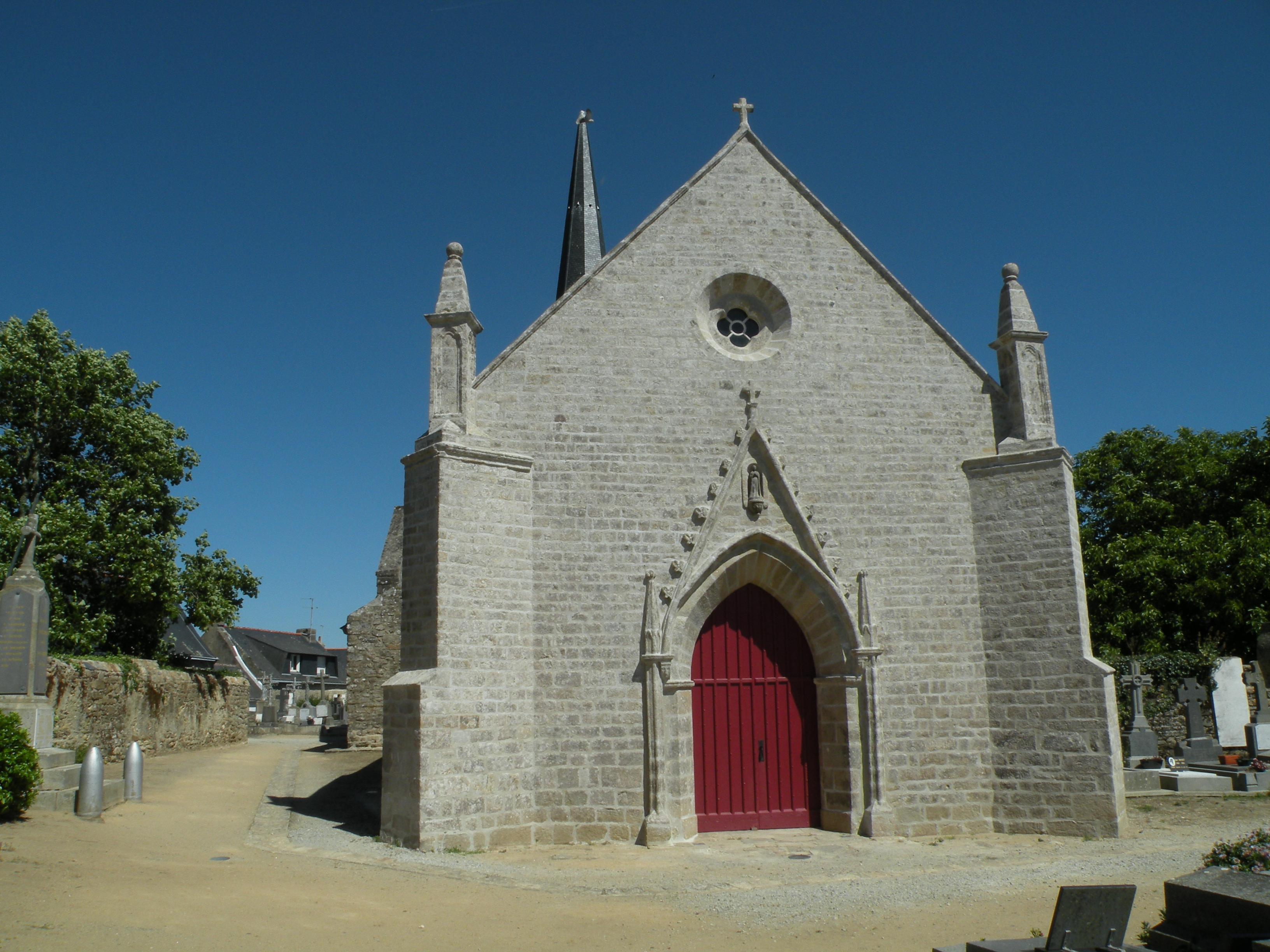 Iliz An Arzh.